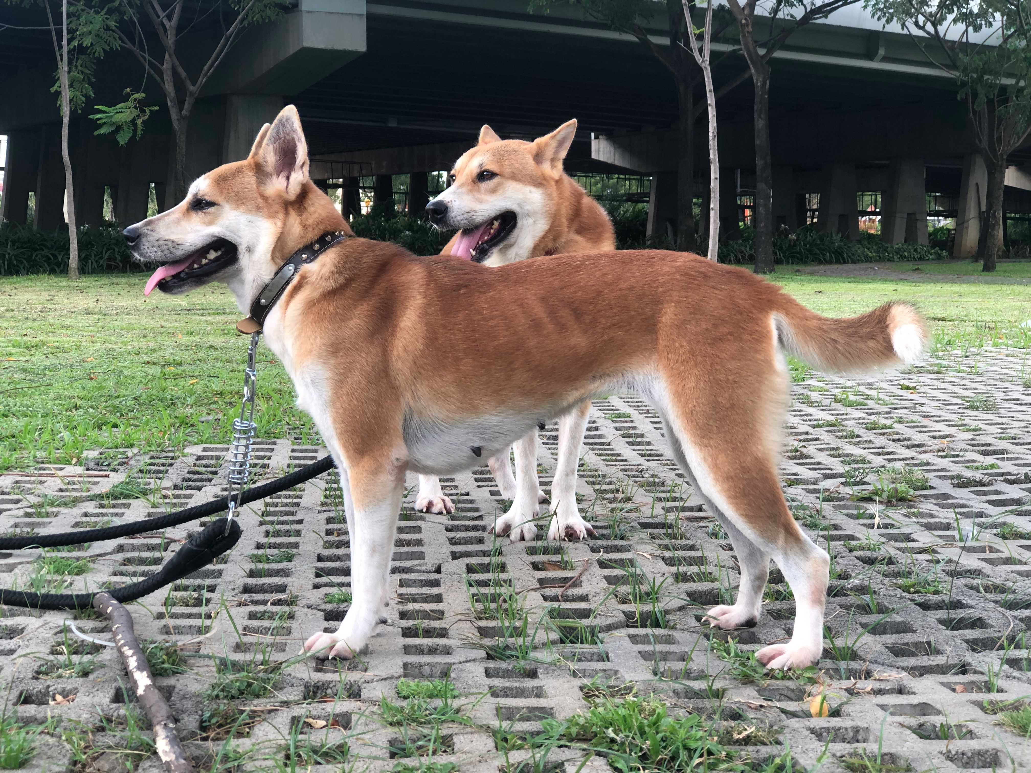 Phở